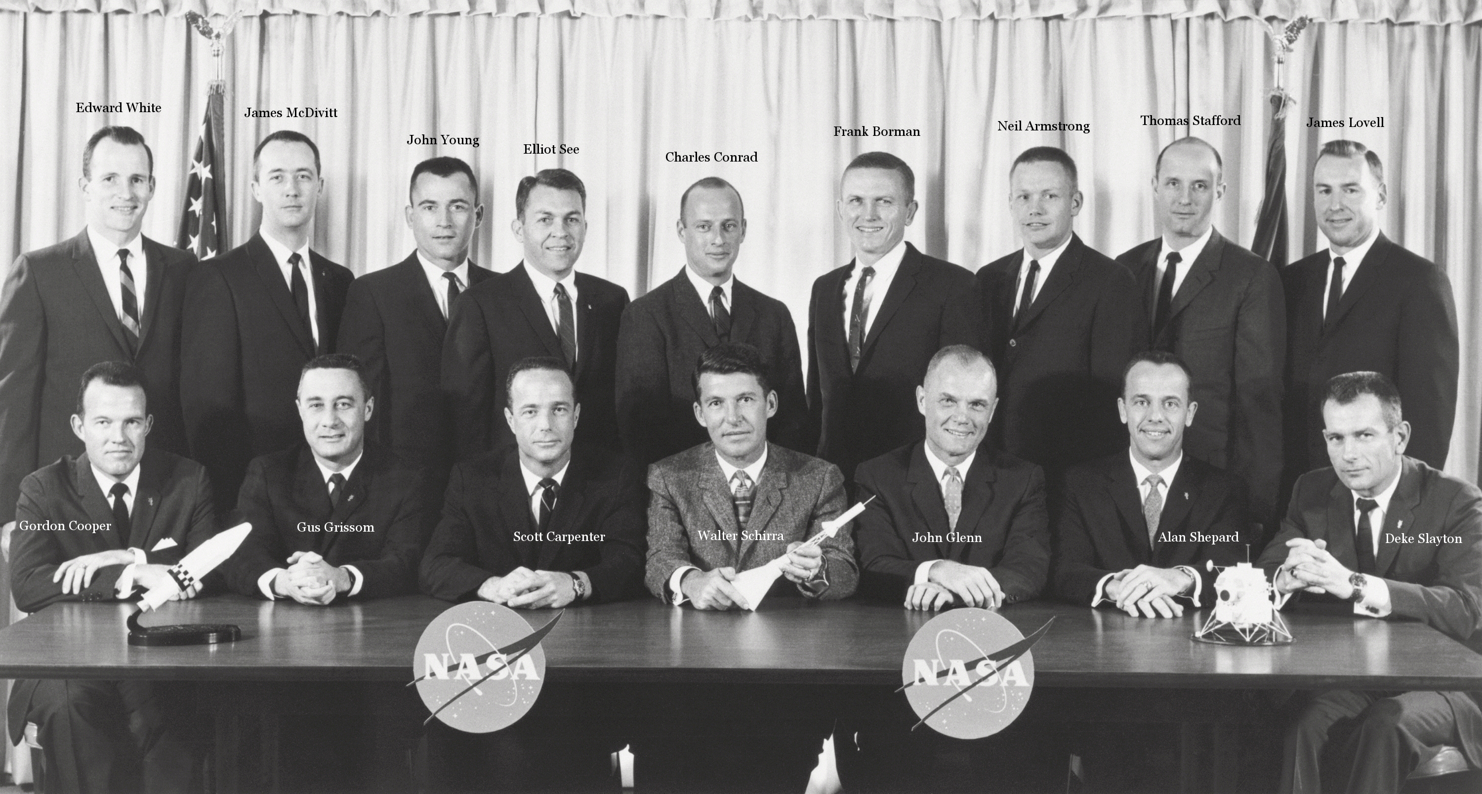 mit Namen